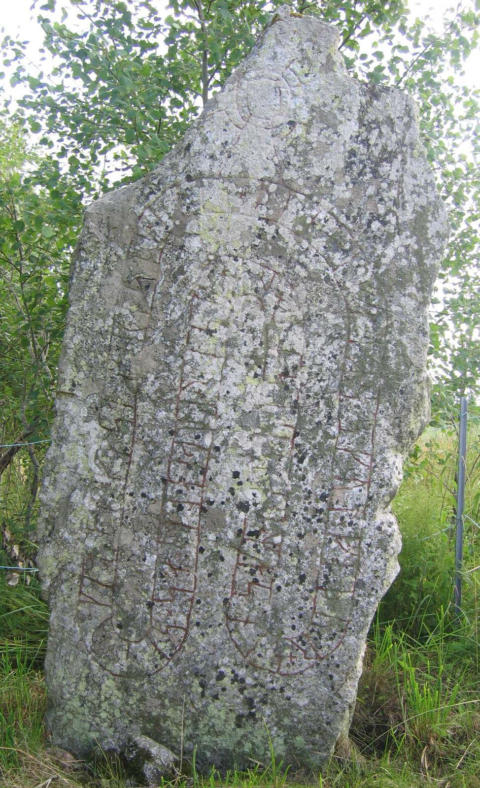 runestone